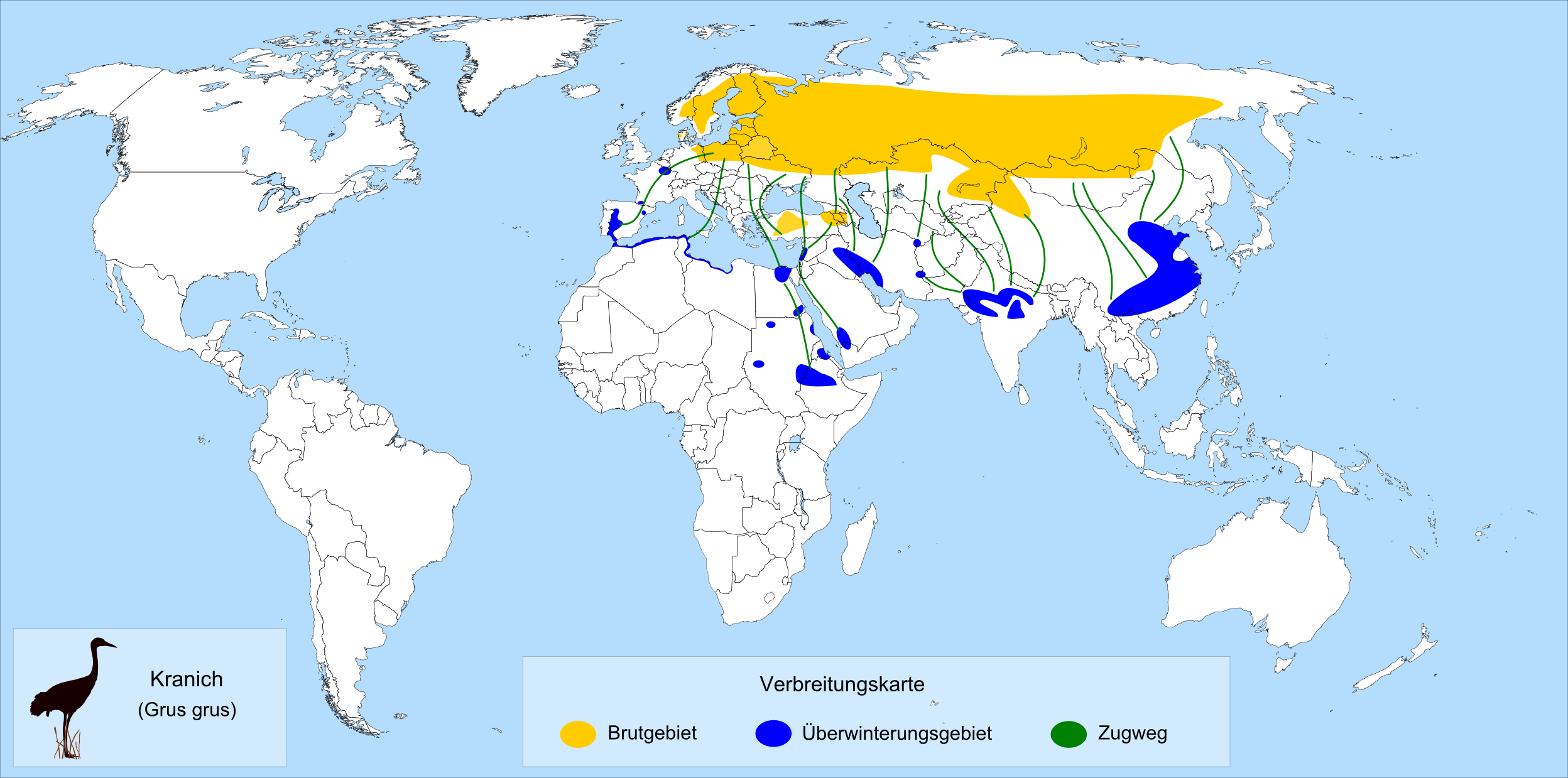 Verbreitungskarte des Kranichs